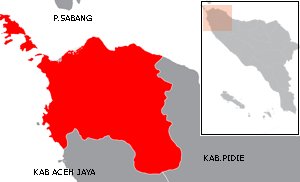 Locator kab Aceh Besar